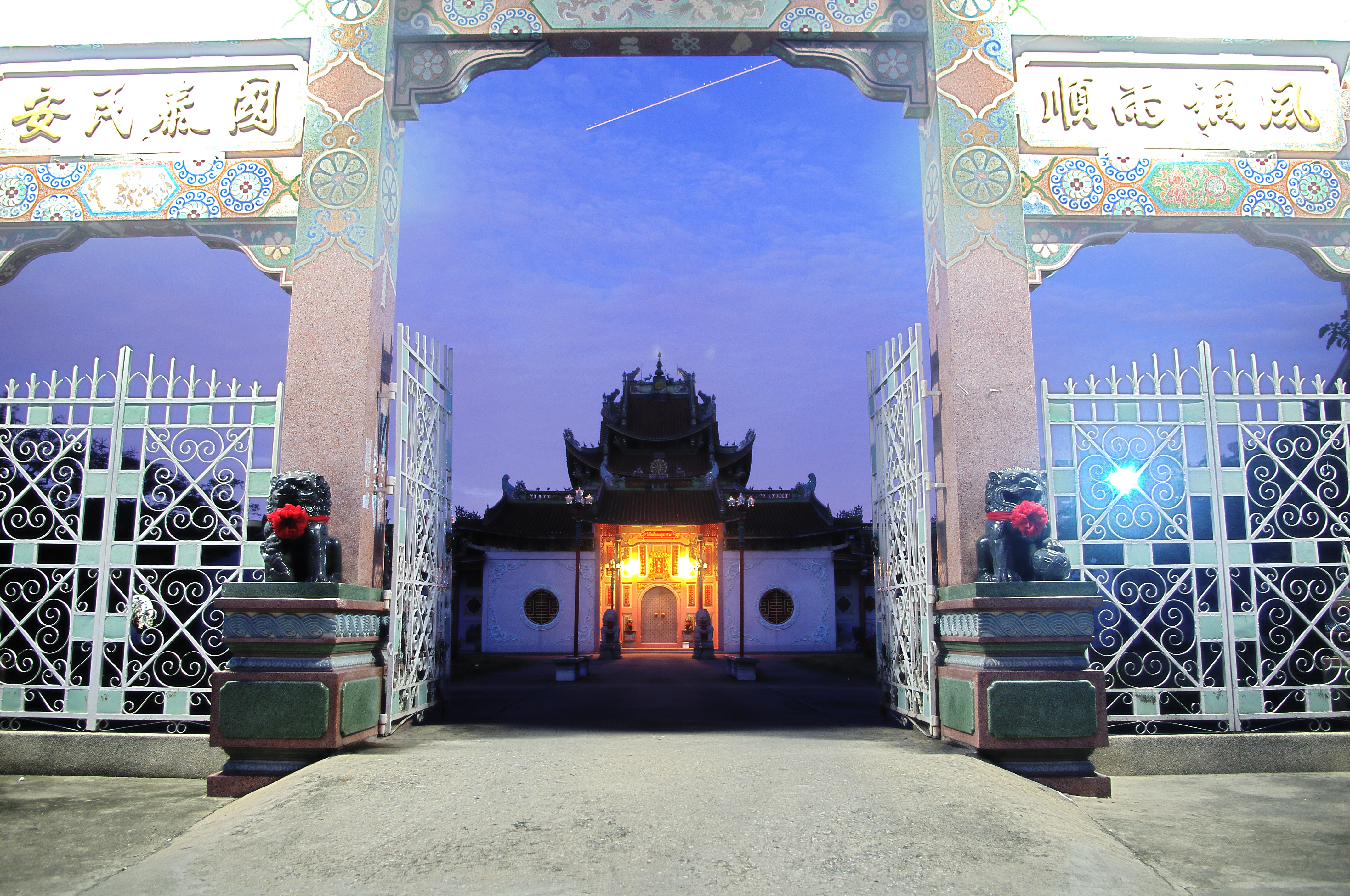 วัดโพธิ์แมนคุณาราม(วัดจีน)